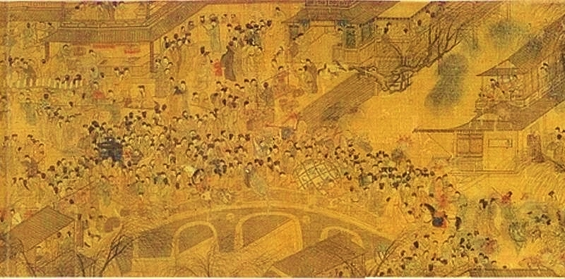 中文（香港）: 明《上元燈彩圖》